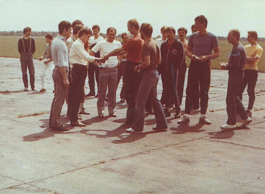 XV Spadochronowe Mistrzostwa Śląska Gliwice 1984, losowanie numerów startowych - Sekcja Spadochronowa Aeroklubu Gliwickiego